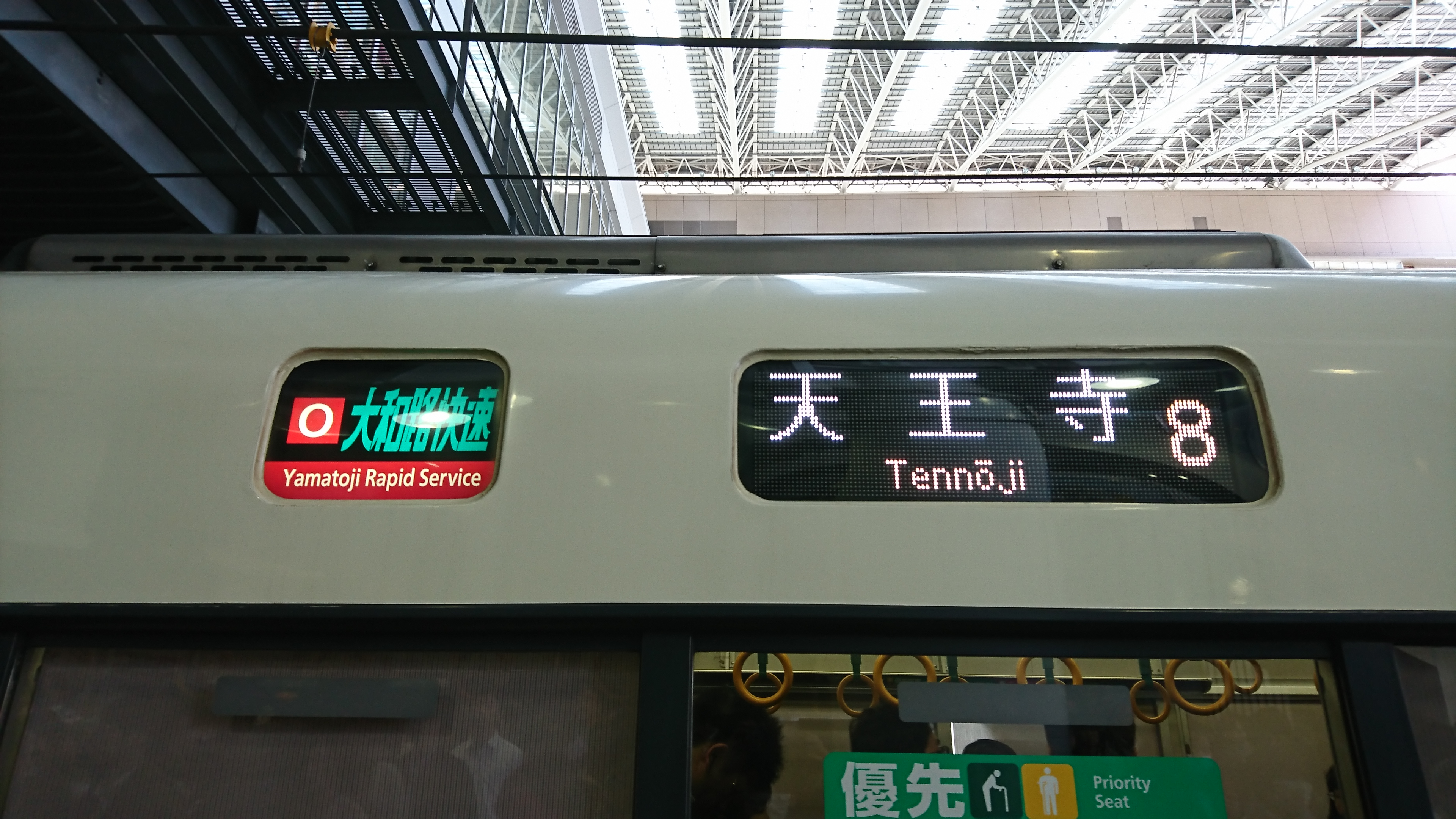 221系 側面LED表示 大阪駅にて